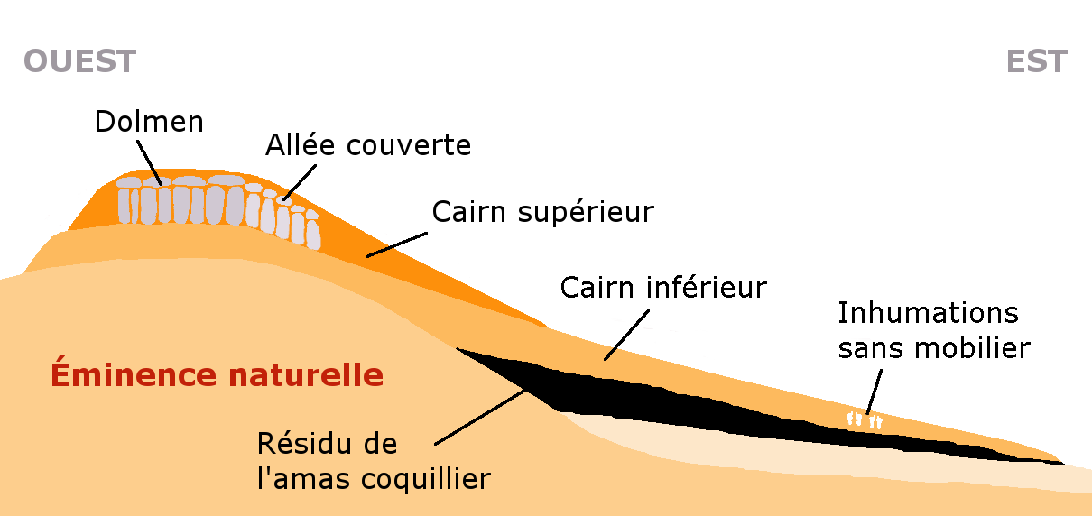 Coupe ouest-est du tumulus de Beg an Dorchenn (ou pointe de la Torche), en Plomeur, dans le pays Bigouden, Finistère, Bretagne. Ne cherchant qu'à faire comprendre l'organisation de ce tumulus, je me suis inspiré, mais grossièrement, sans respect des formes ni des proportions ni des indications données, d'un croquis de Pierre-Roland Giot, publié p. 168 de l'article « Le tumulus mégalithique de Beg an Dorchenn en Plomeur (Finistère) », Gallia, t. V, 1947.